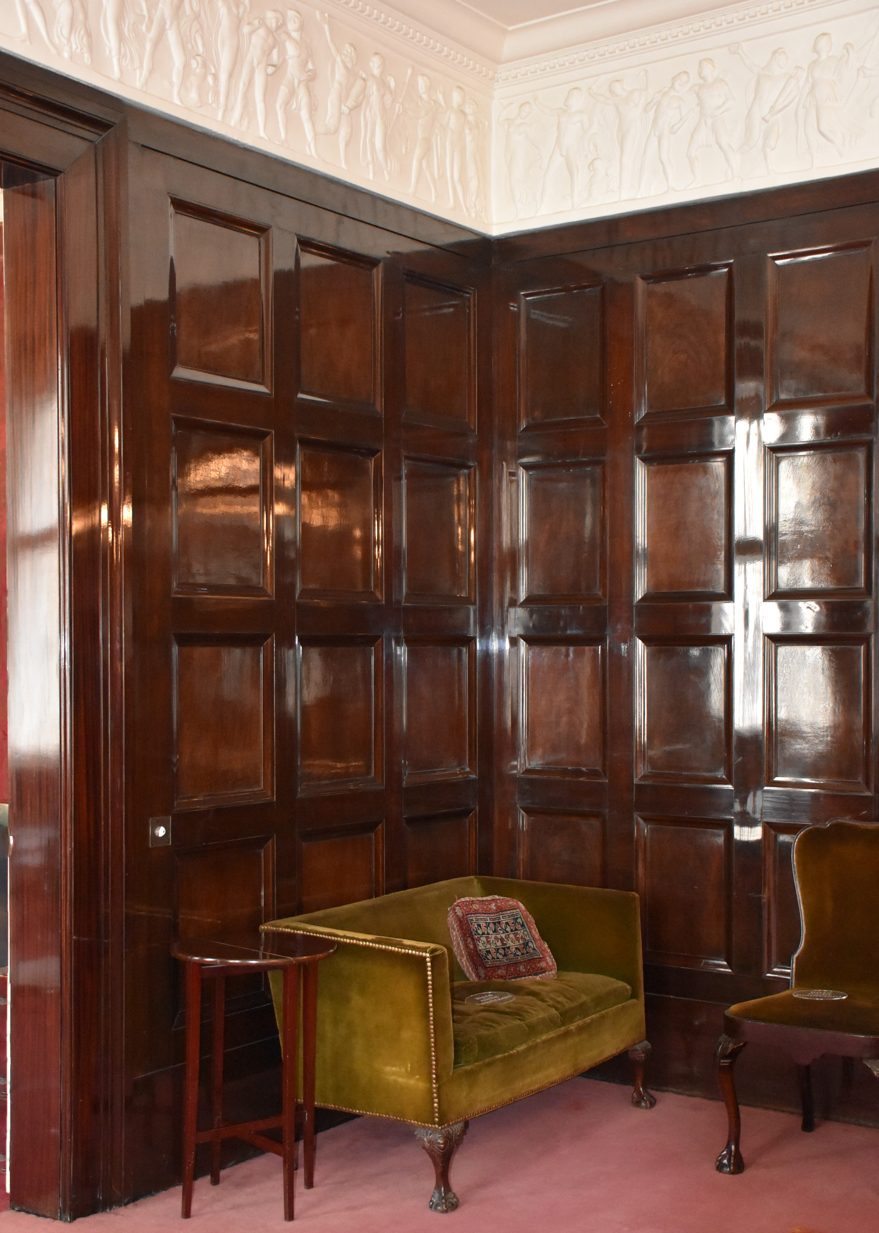 Wienbibliothek – Musiksammlung Dieses Bild wurde anlässlich des österreichischen Tags des Denkmals 2015 in Wien eingereicht.